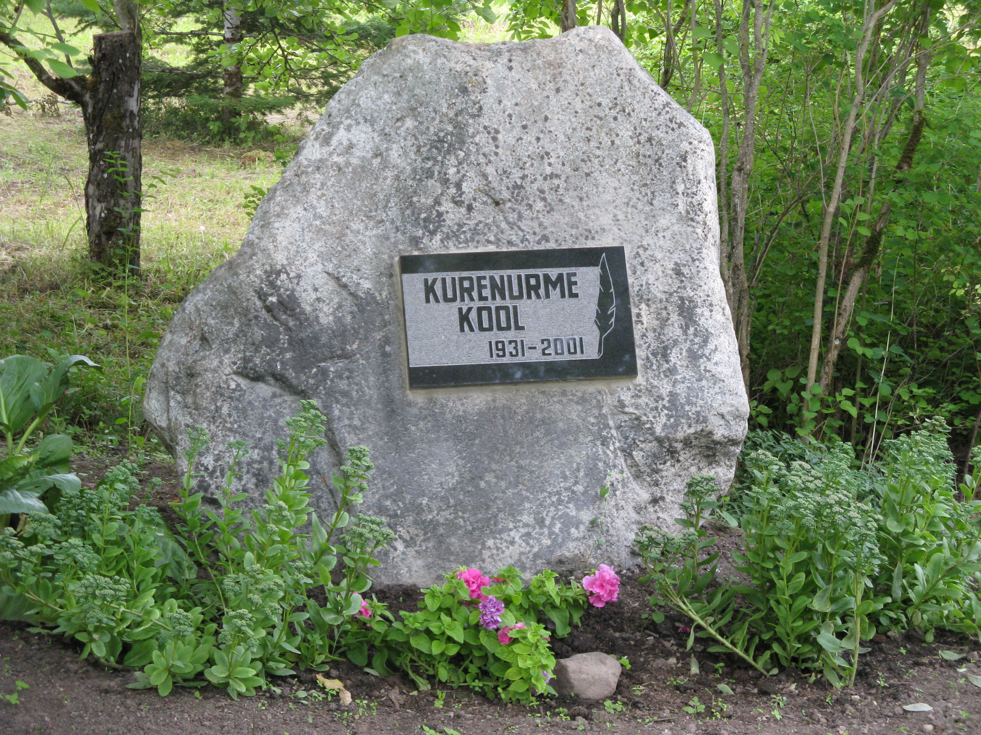 Kurenurme Koolile pärast sulgemist püstitatud mälestusmärk. Eesti, Võrumaa, Sõmerpalu vald, Kurenurme küla